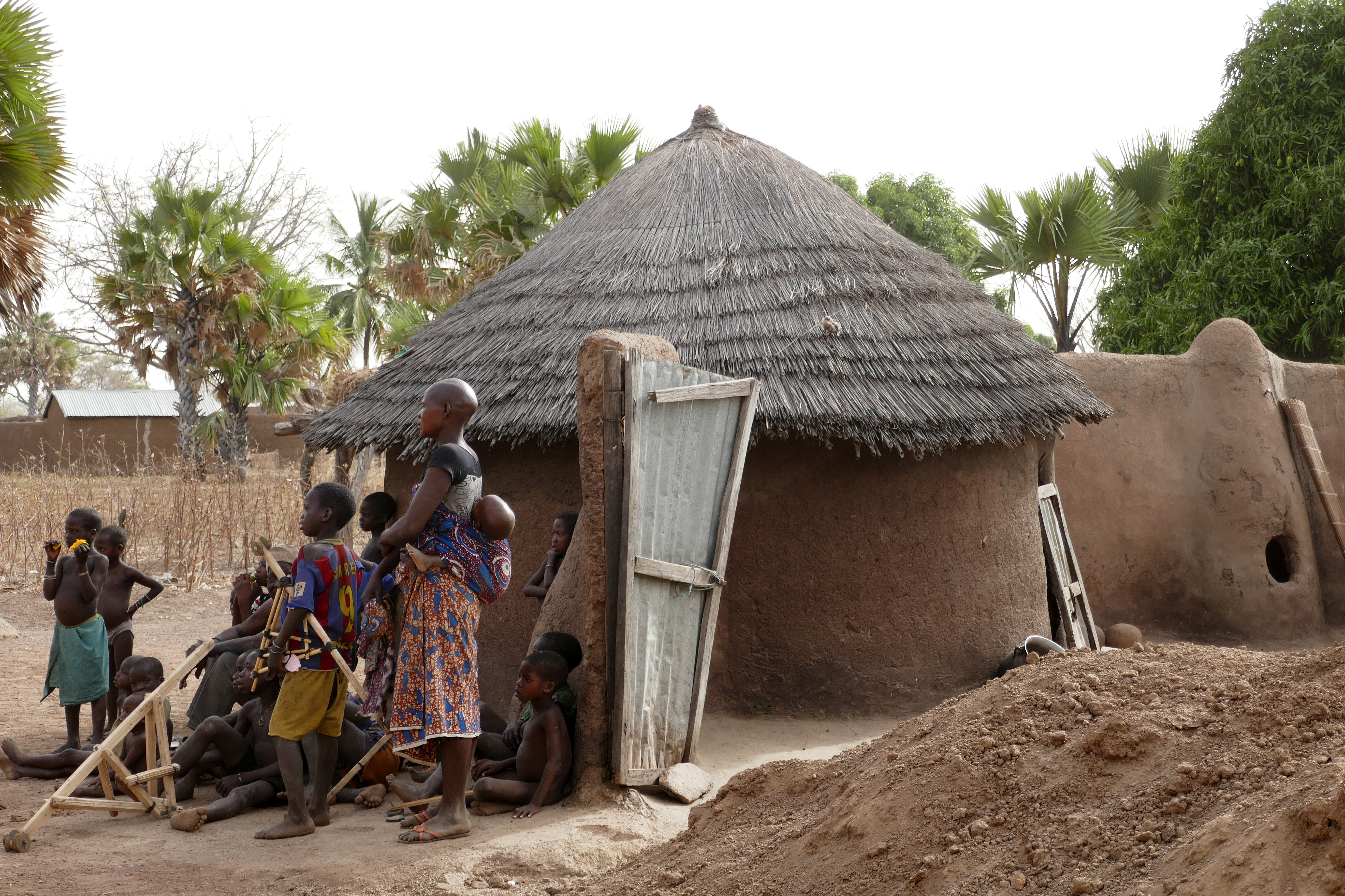 Village otammari dans le nord-ouest du Bénin (Manta, Boukoumbé).